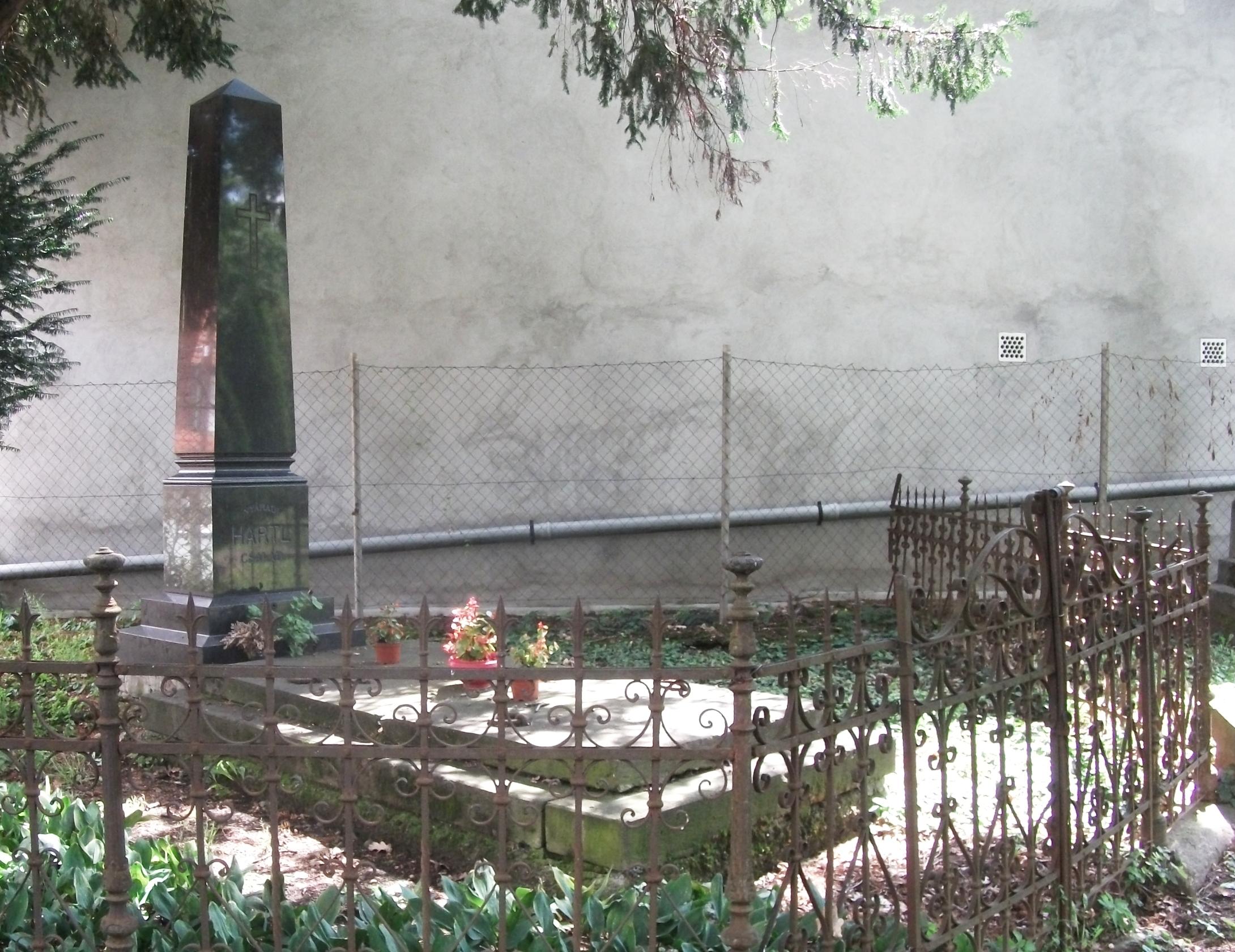 A Nyárádi Hartl család síremléke (Eger, Grőber temető)